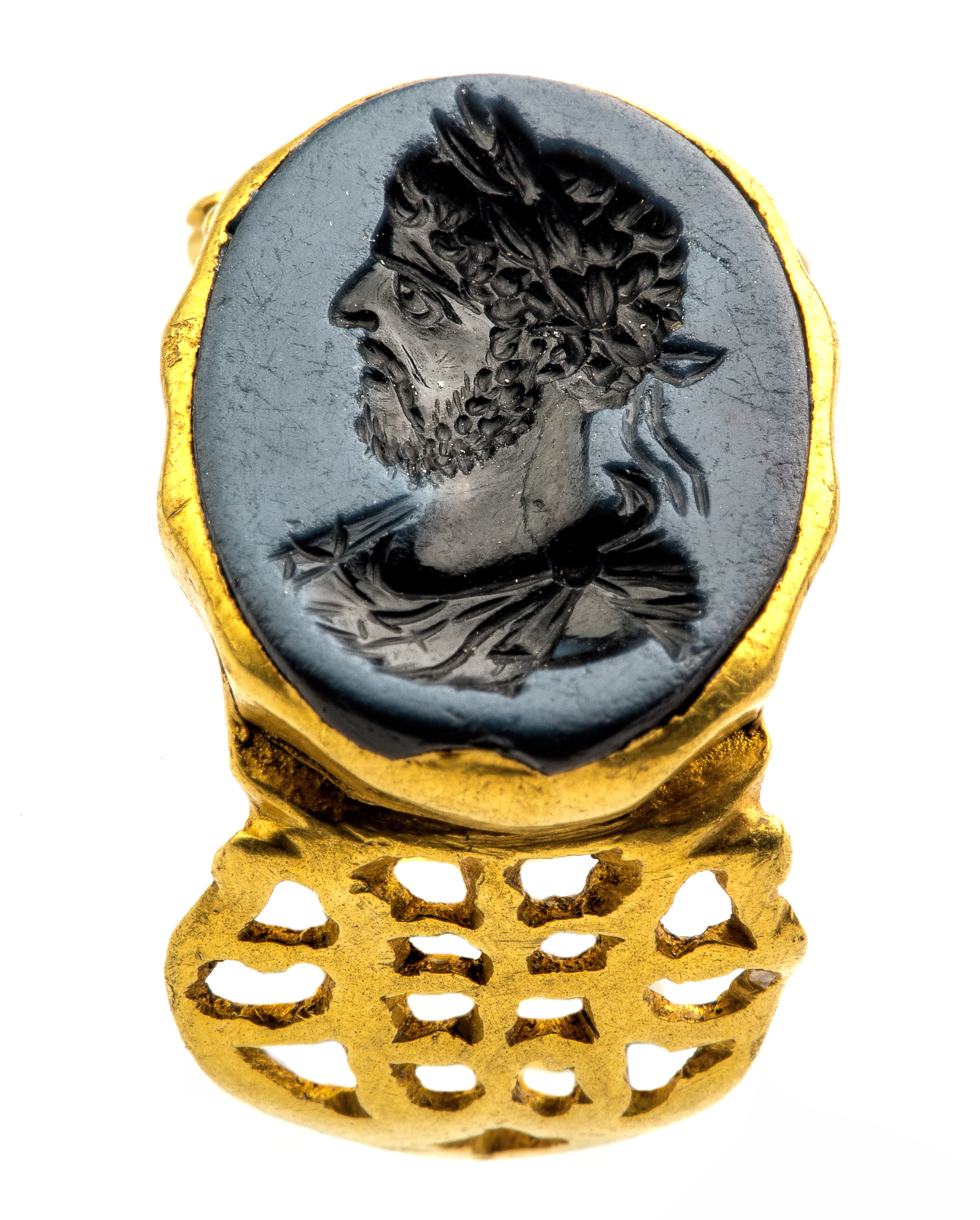 Zegelring in goud met intaglio met portret van Commodus in nicolo, 180 tot 200 NC, vindplaats: Tongeren, de Schaetzengaarde 22, 1998, losse vondst (mogelijk goudschat), collectie Gallo-Romeins Museum Tongeren, GRM 1892